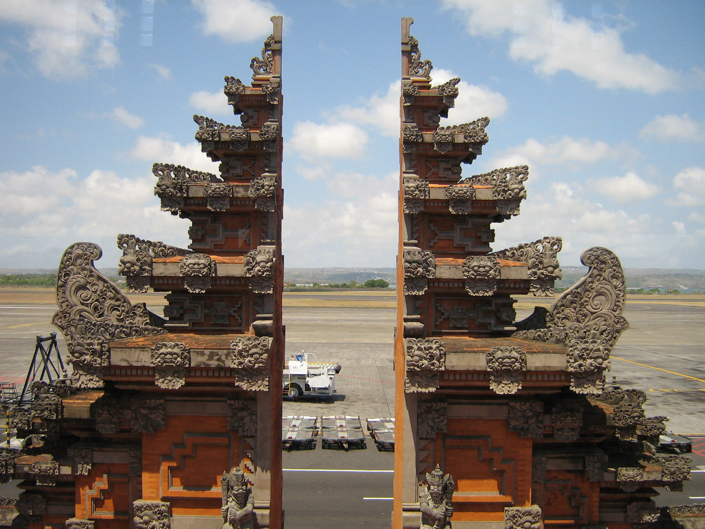 balinese gate at Denpasar Airport